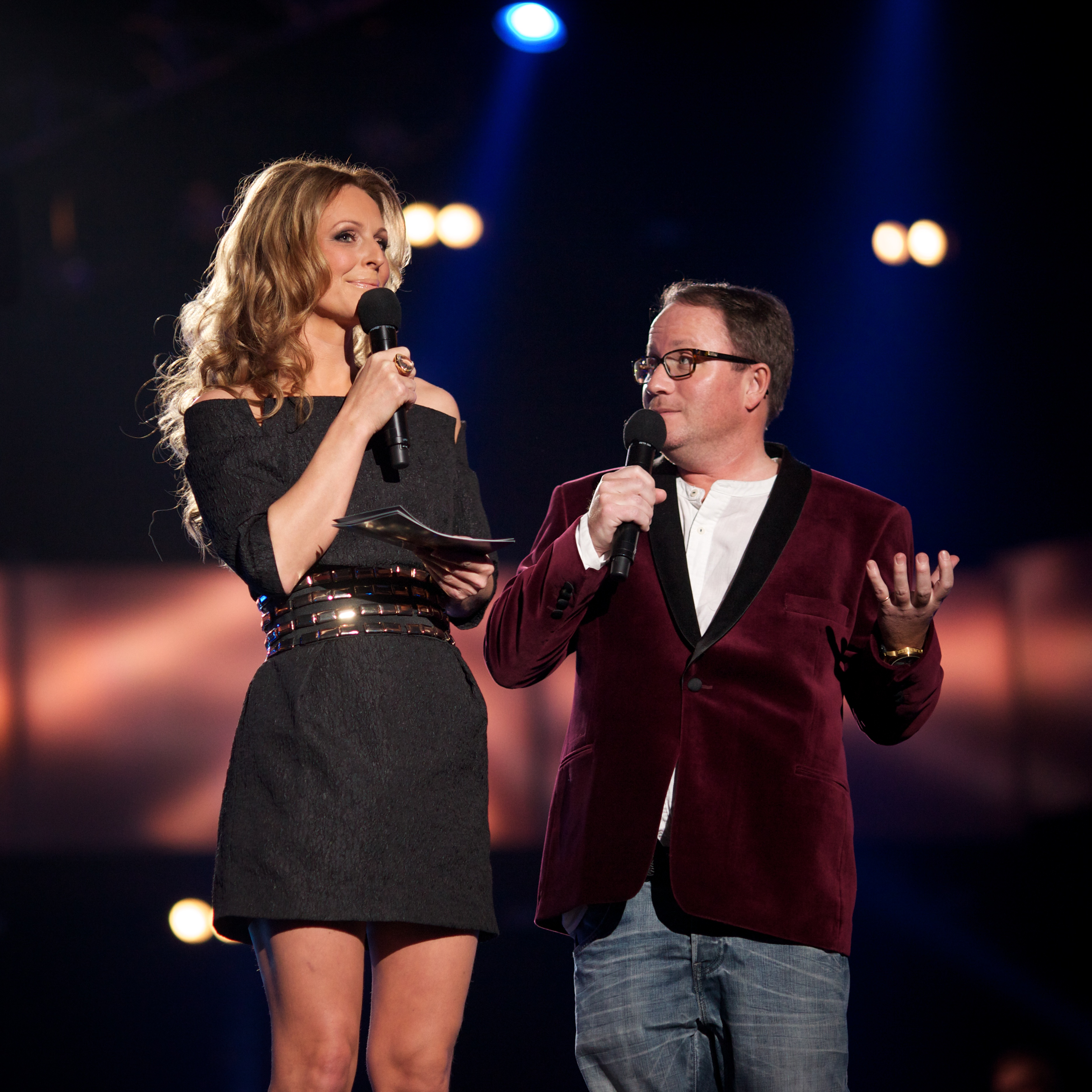 Konferansierer MGP 2012 delfinale i Larvik